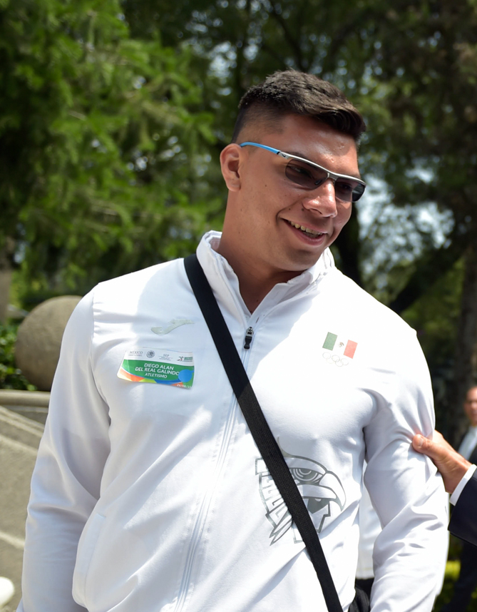 El Presidente Enrique Peña Nieto se reunió hoy con los deportistas que integraron la delegación mexicana que participó en los Juegos Olímpicos de Río de Janeiro 2016, a quienes les expresó su reconocimiento por el esfuerzo, la entrega, el empeño y el coraje que demostraron en esta justa olímpica y durante el proceso para llegar a ella.